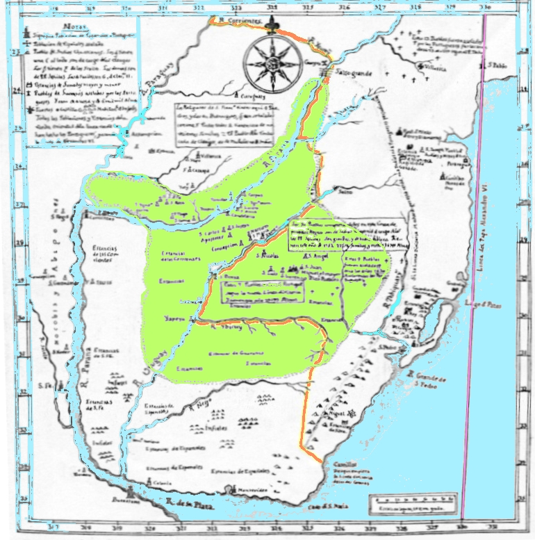 mapa de la divison entre españa y portugal de las Misiones Jesuíticas en 1752 trabajo propio basado en image:Paraguay1.jpg de wiki commons pruxo 2007